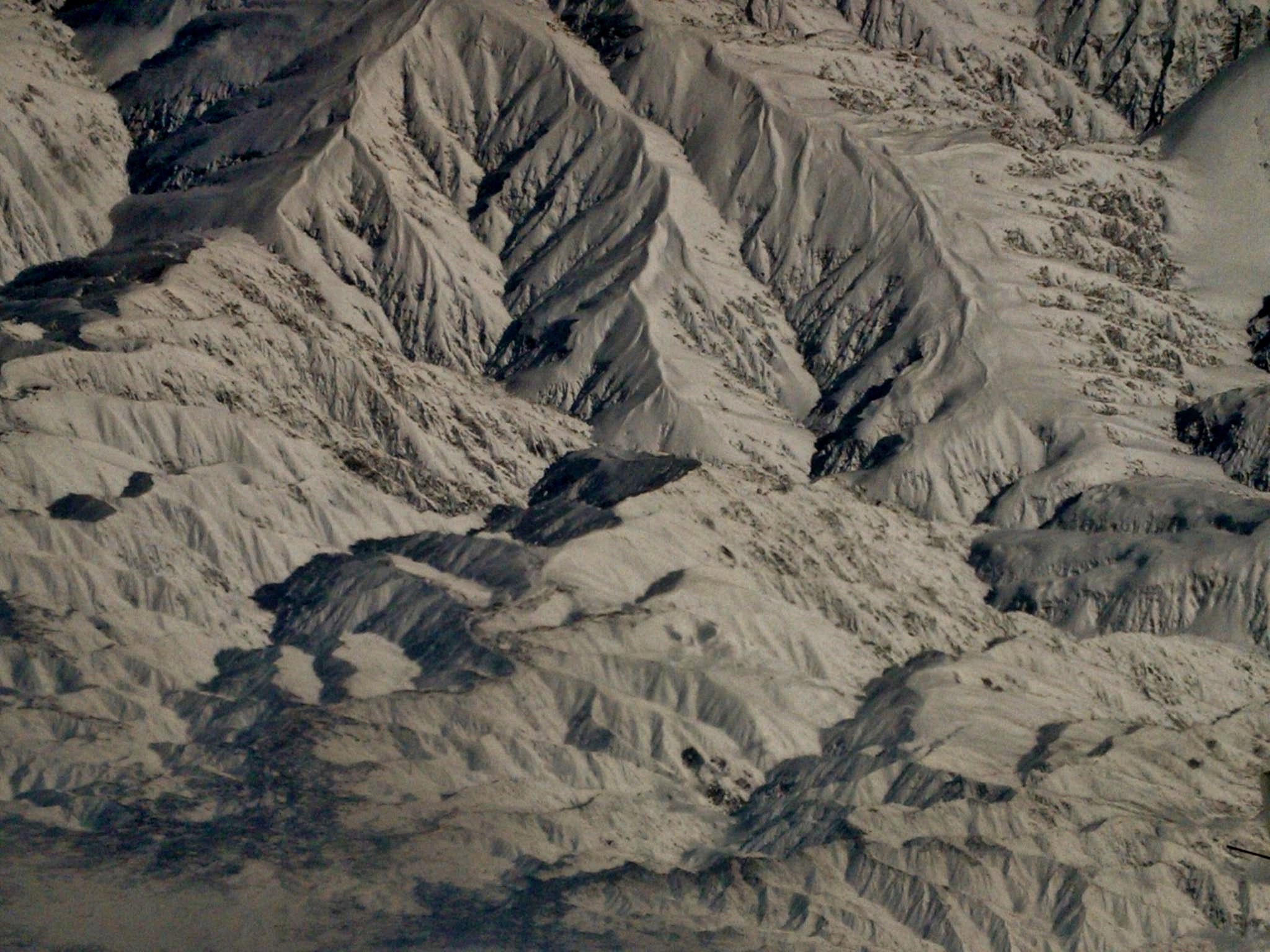 Tämä kuva Hindukusista on otettu Finnairin lennolta Delhistä Helsinkiin helmikuussa vuonna 2013